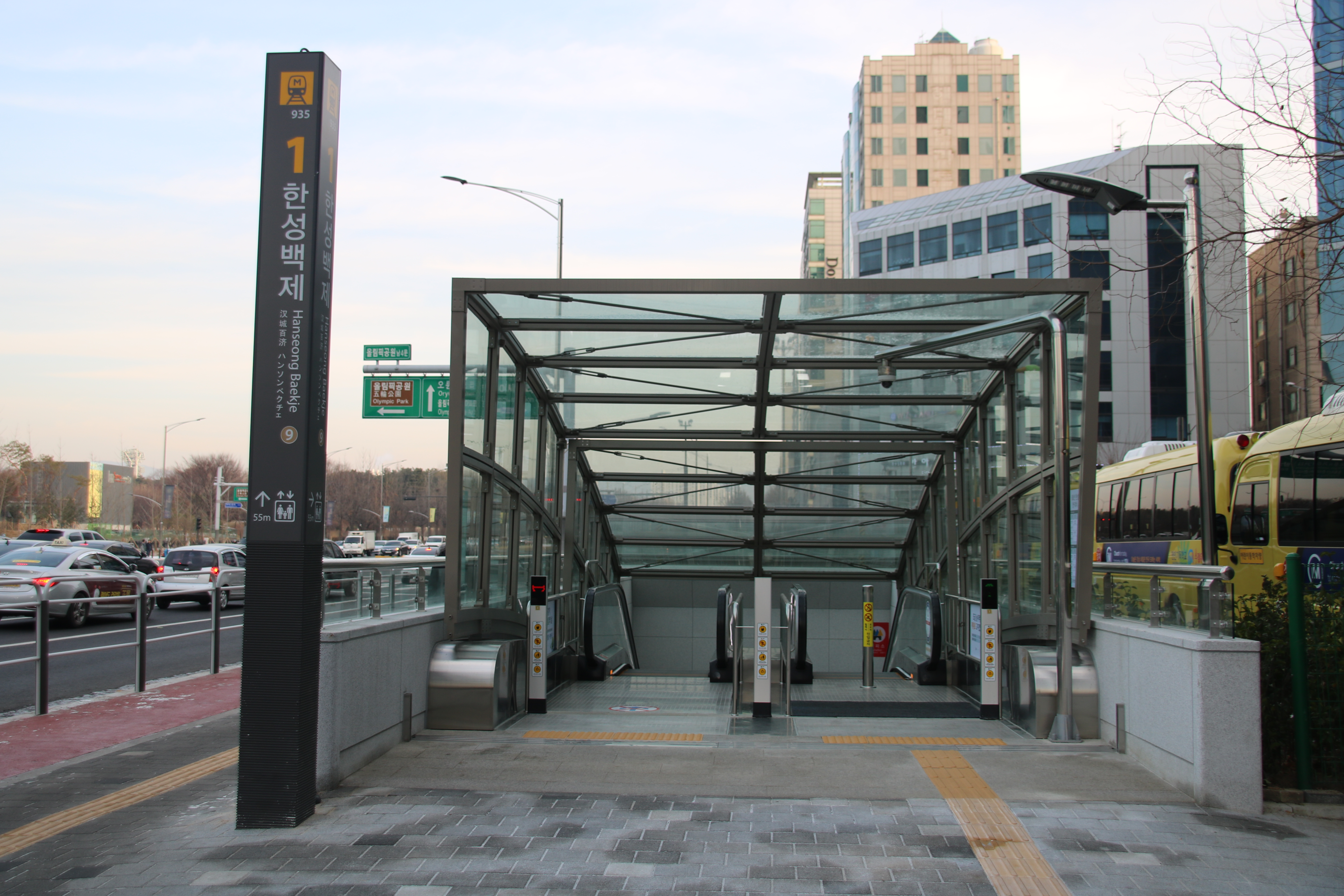 한성백제역 1번 출입구